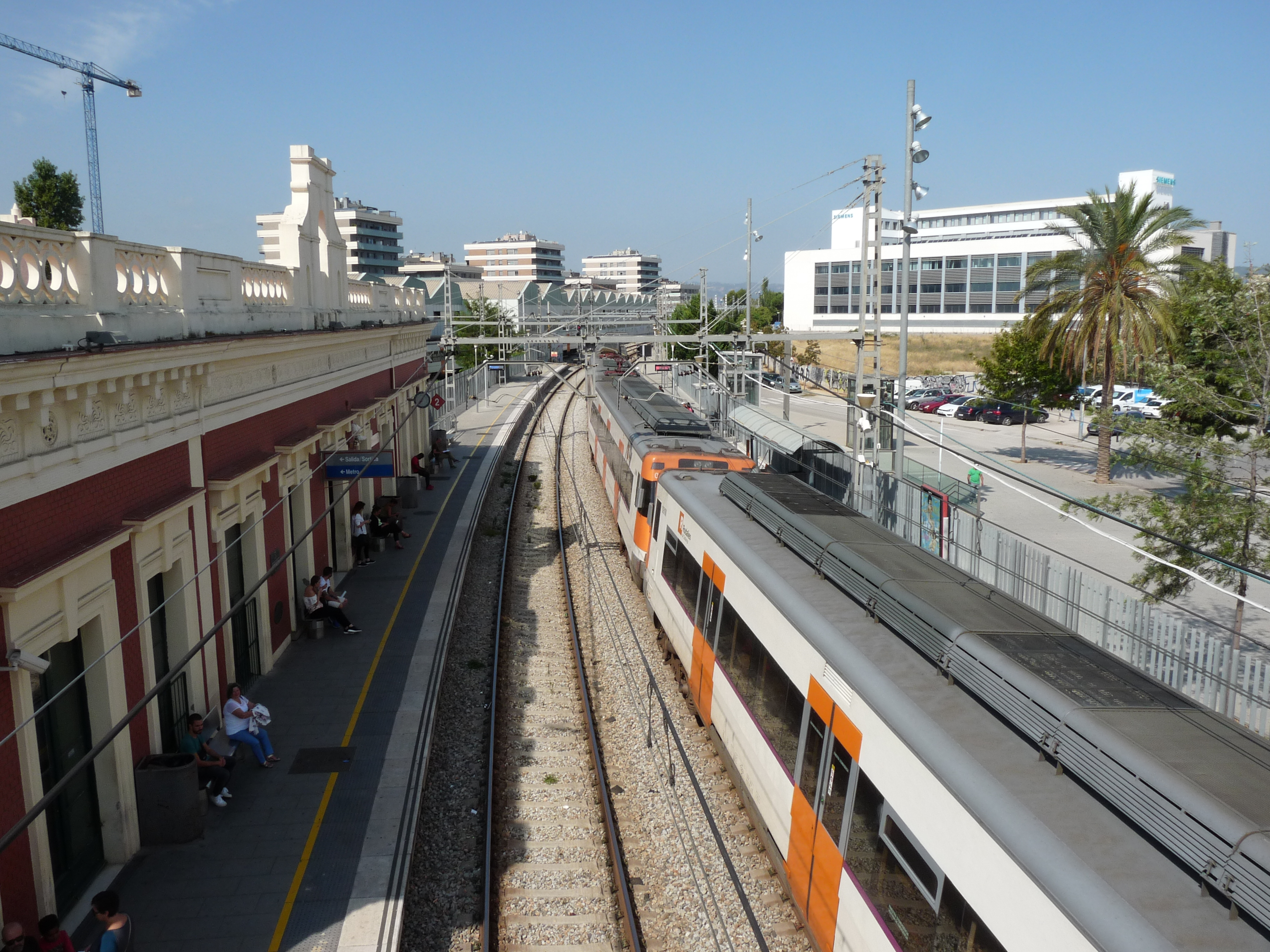 Stoptrein in Cornellà station